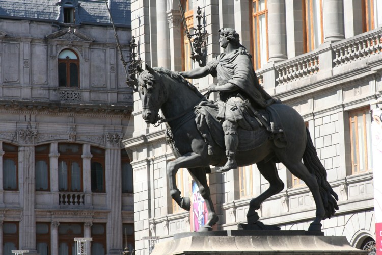 Nombre: El_caballito_de_Tolsa_b Fotografió: Carlos Martínez Blando (2005) Otra información: Estatua ecuestre en la Ciudad de México. Tomado con una cámara Canon Digital Rebel XT.